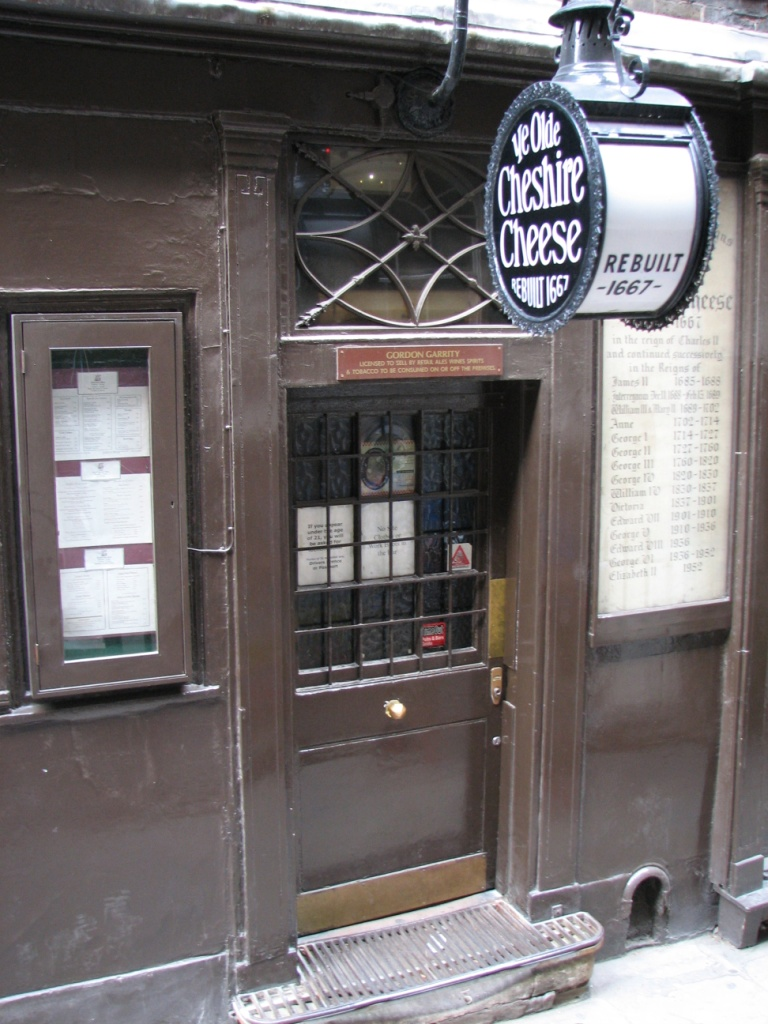 יי אולד צ'שייר צ'יז